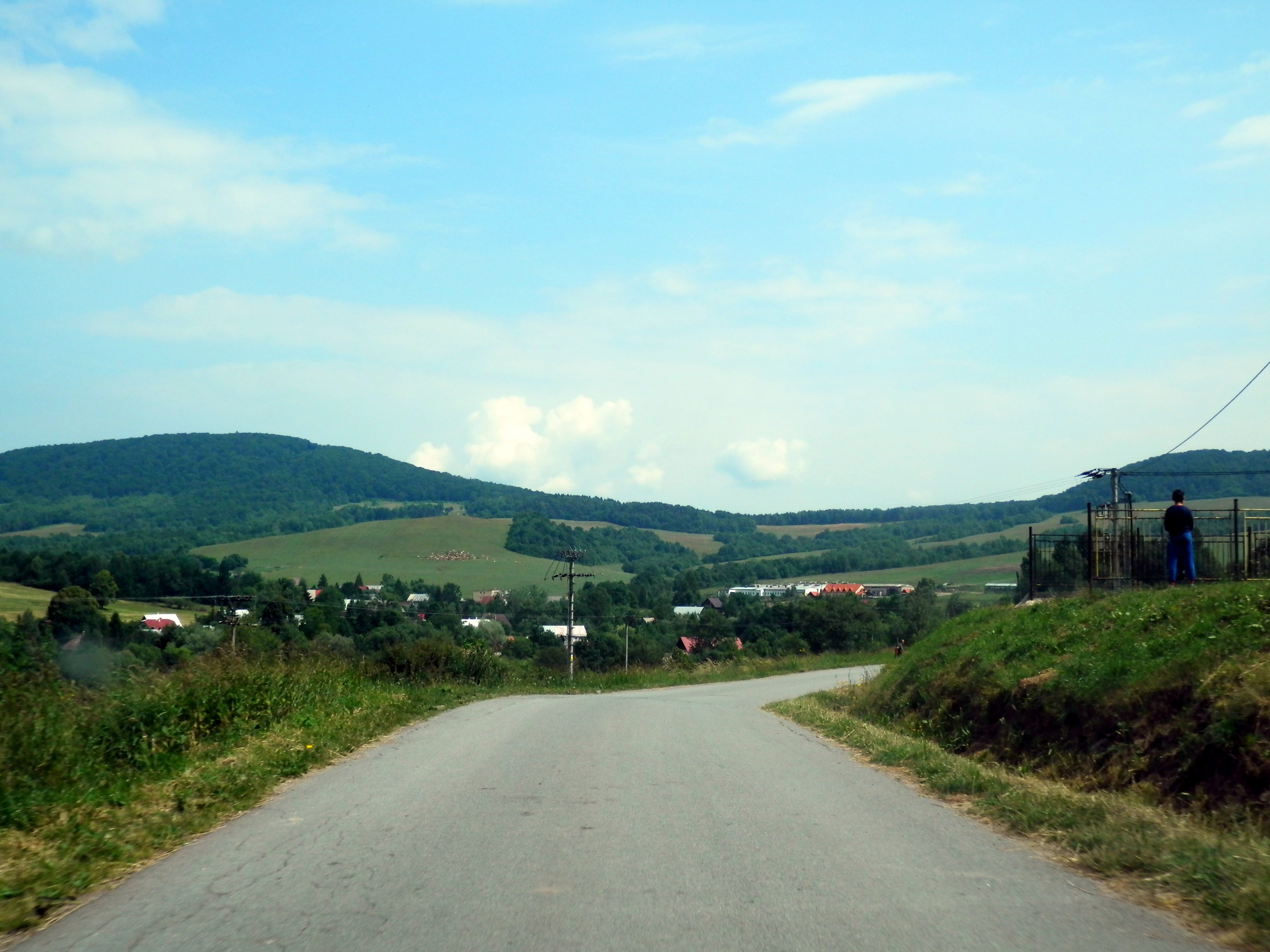 Obec Cigeľka okres Bardejov.